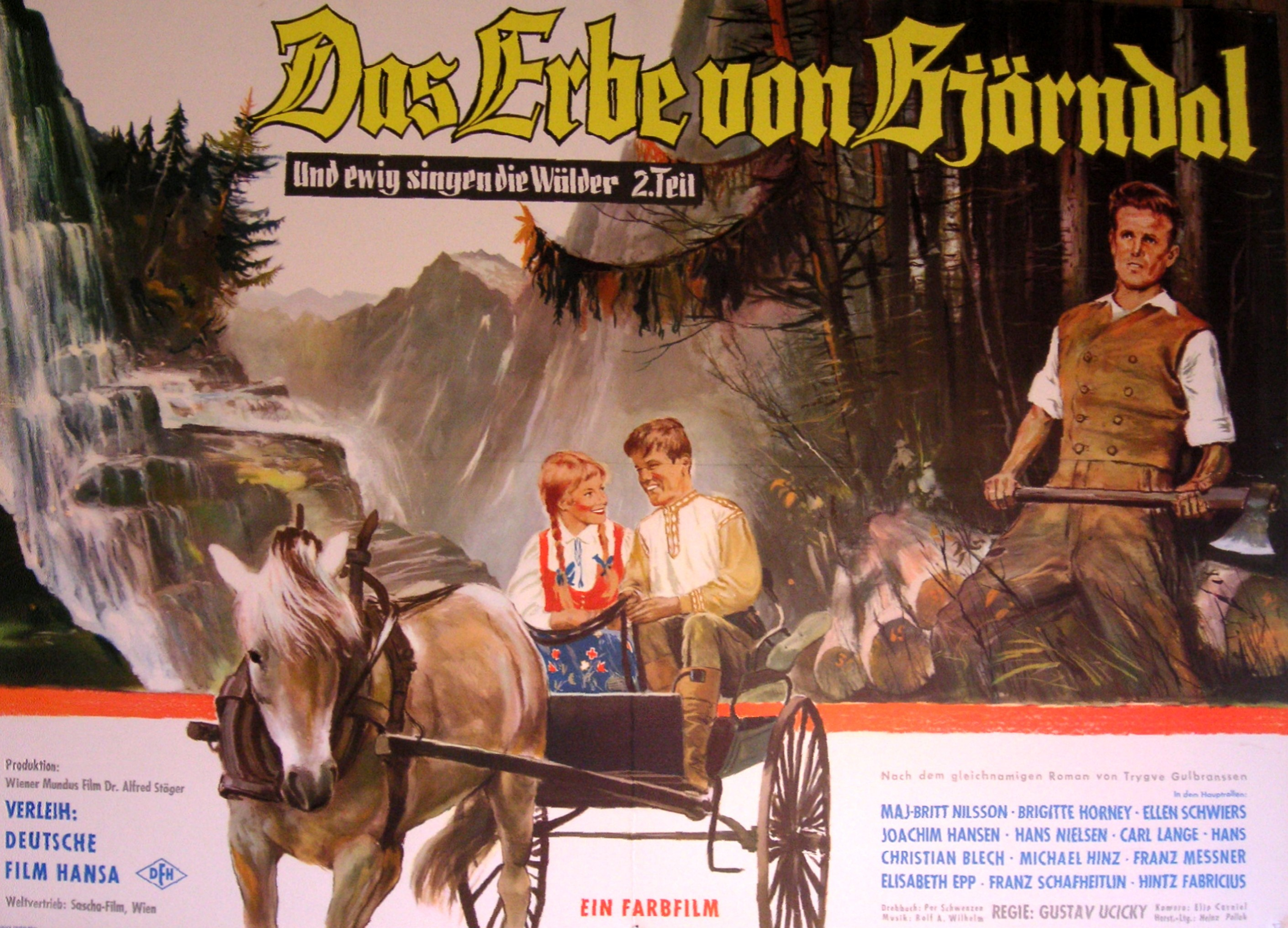 Filmplakat zum Film: Das Erbe von Björndal (1960)